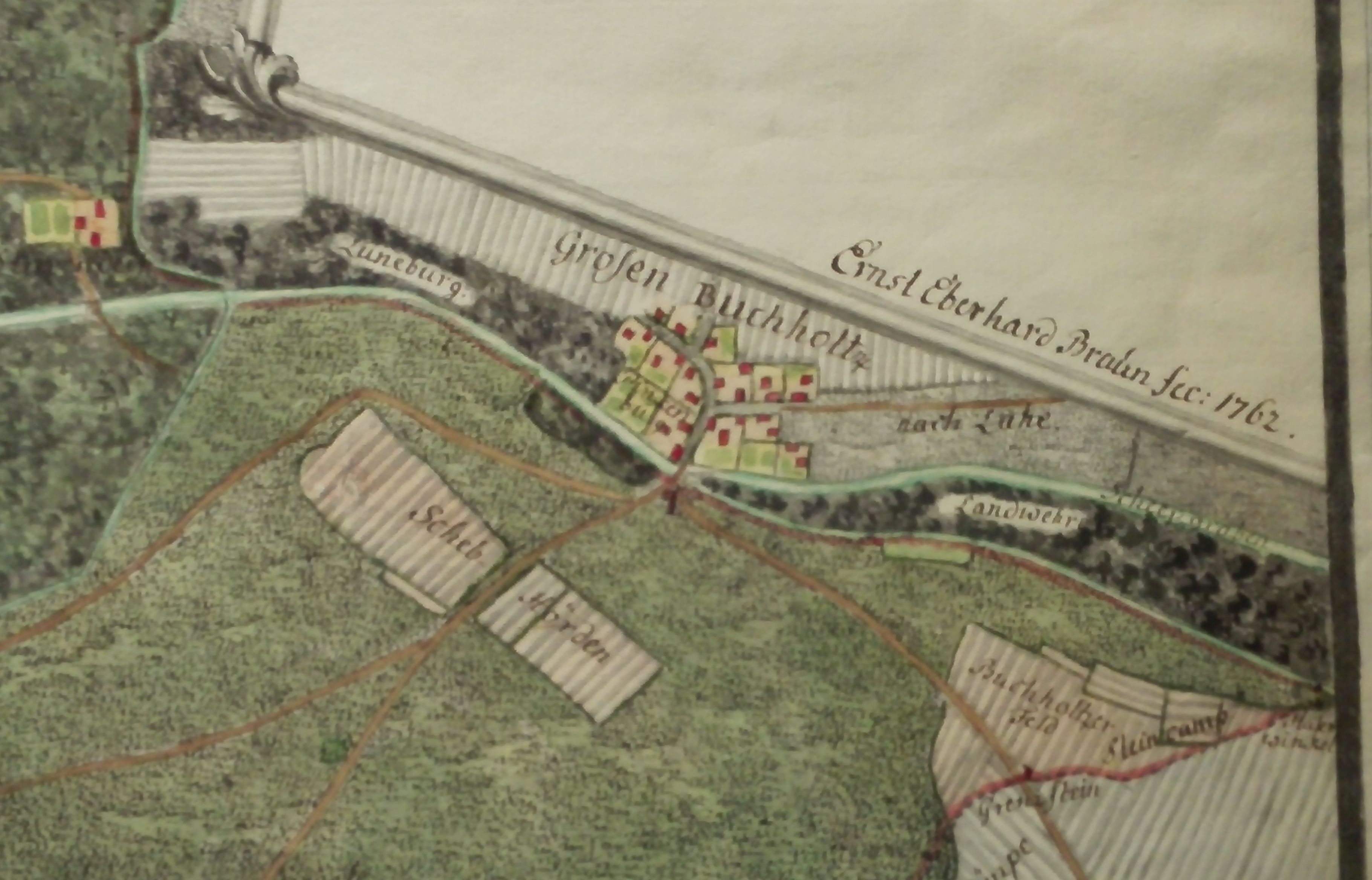 Ernest Eberhard Braun (auch: Ernst Eberhard Braun oder in der Signatur oft E. E. Braun) war im 17. und 18. Jahrhundert zur Zeit des Kurfürstentums Hannover ein deutscher Leutnant, Artillerie-Oberst, Planvermesser und Planzeichner mindestens in der Residenzstadt Hannover sowie in Einbeck ... Ausschnitt aus dem farbig gezeichneten Plan Situation der Stadt Hannover in specie derer Grenzen von Hude und Weide so der Alt-Städer Bürgerschaft in denen umliegenden Ämtern, theils Privative, Theils gemeinschaftlich zuständig ist, signiert mit „Ernst Eberhard Braun fec [fecit] 1762“. Ausschnitt „Großen Buchholtz“ (= Groß-Buchholz mit Angaben weiterer Örtlichkeiten wie Pinkenburg, Schiffgraben, Lüneburger Landwehr, Lahe.